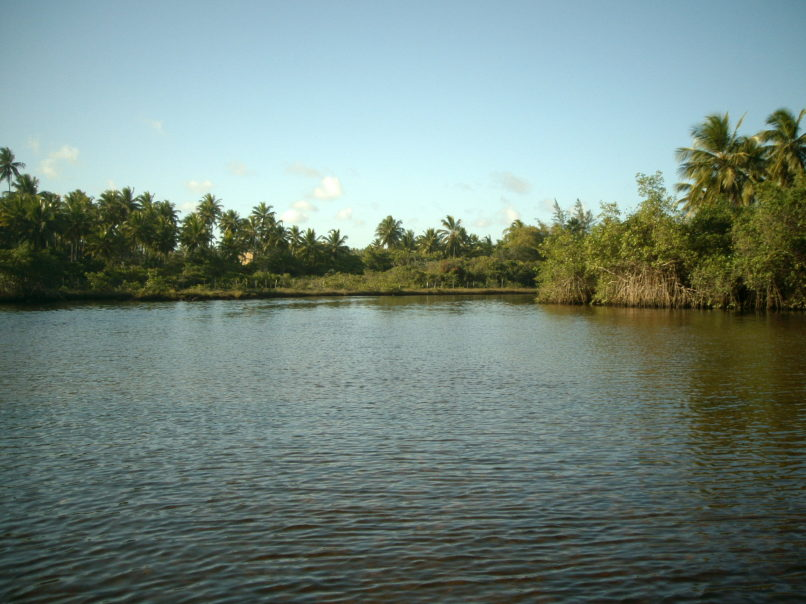 Foto que tirei em Imbassaí em Mata de Sao João no litoral norte da Bahia.